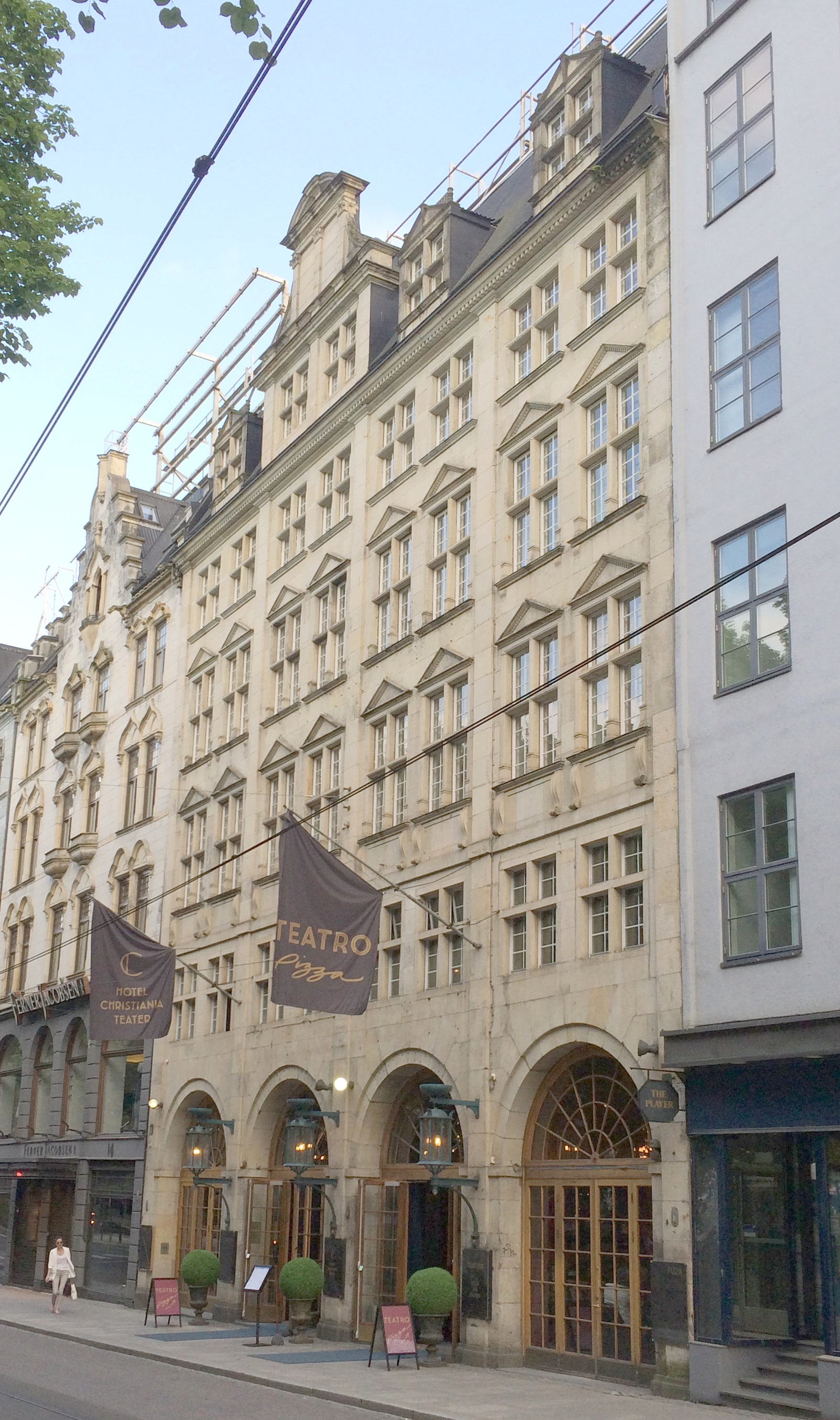 Hotel Christiania Teater (tidligere Opéra Comique, Casino teater, Filmteatret mm.). Arkitekt: Henry Fearnley Coll (1917–18).